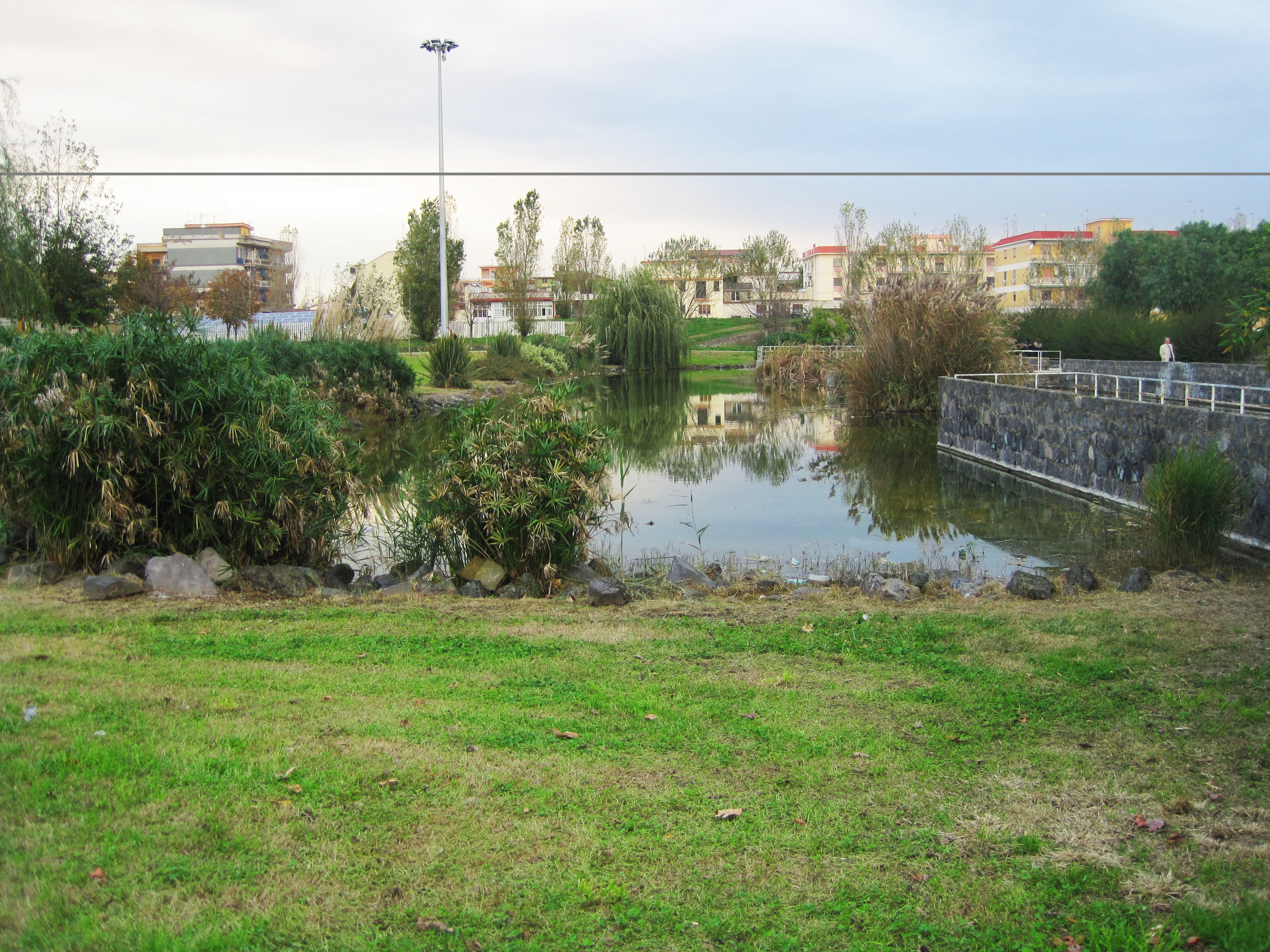 Foto Villa Comunale, scattata da me, nel mio paese Pomigliano D'Arco.